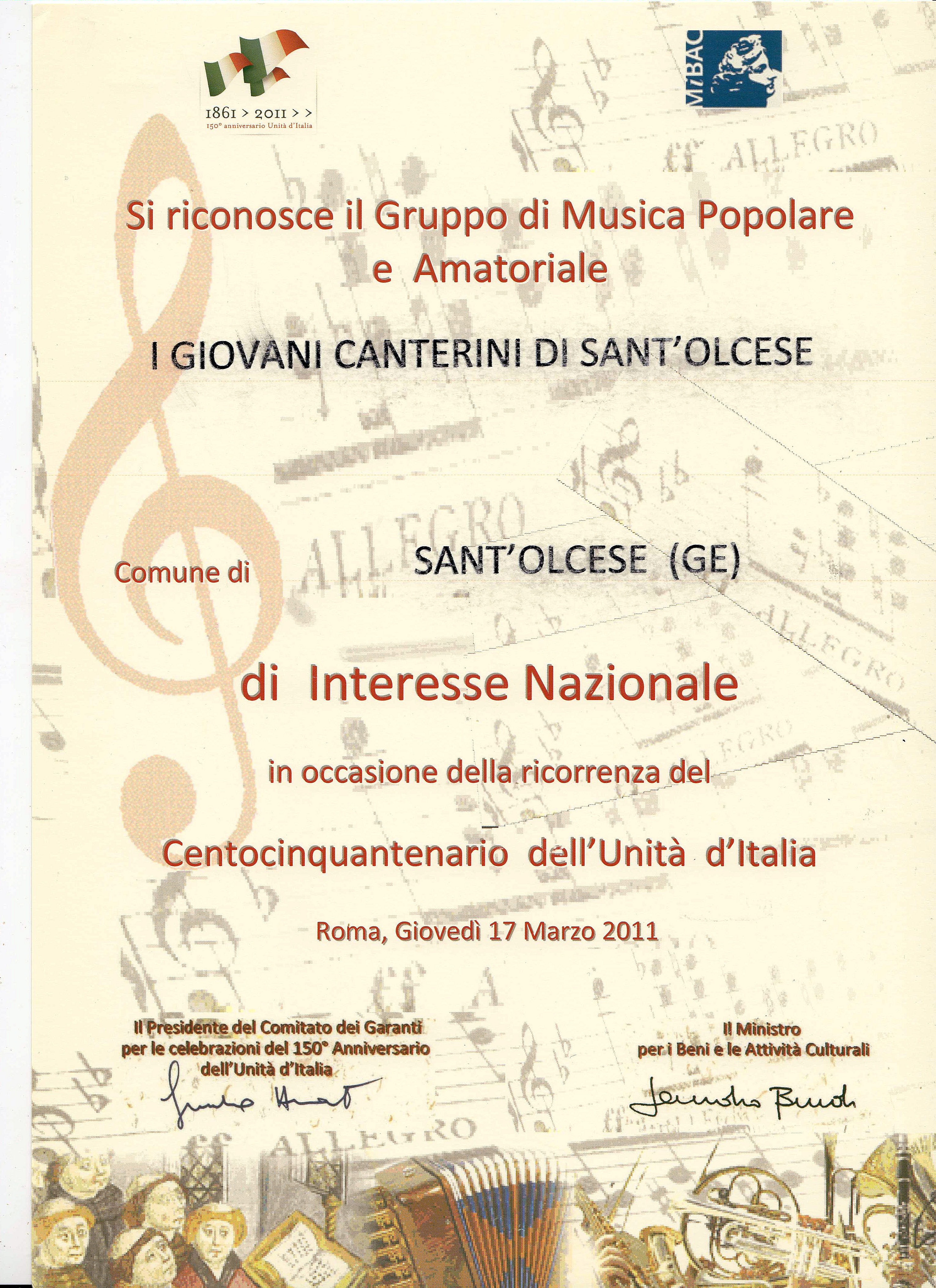 Attestato di Gruppo di Interesse Nazionale, conferito nel 2011 ai Giovani Canterini di Sant'Olcese dall'allora ministro della cultura Sandro Bondi